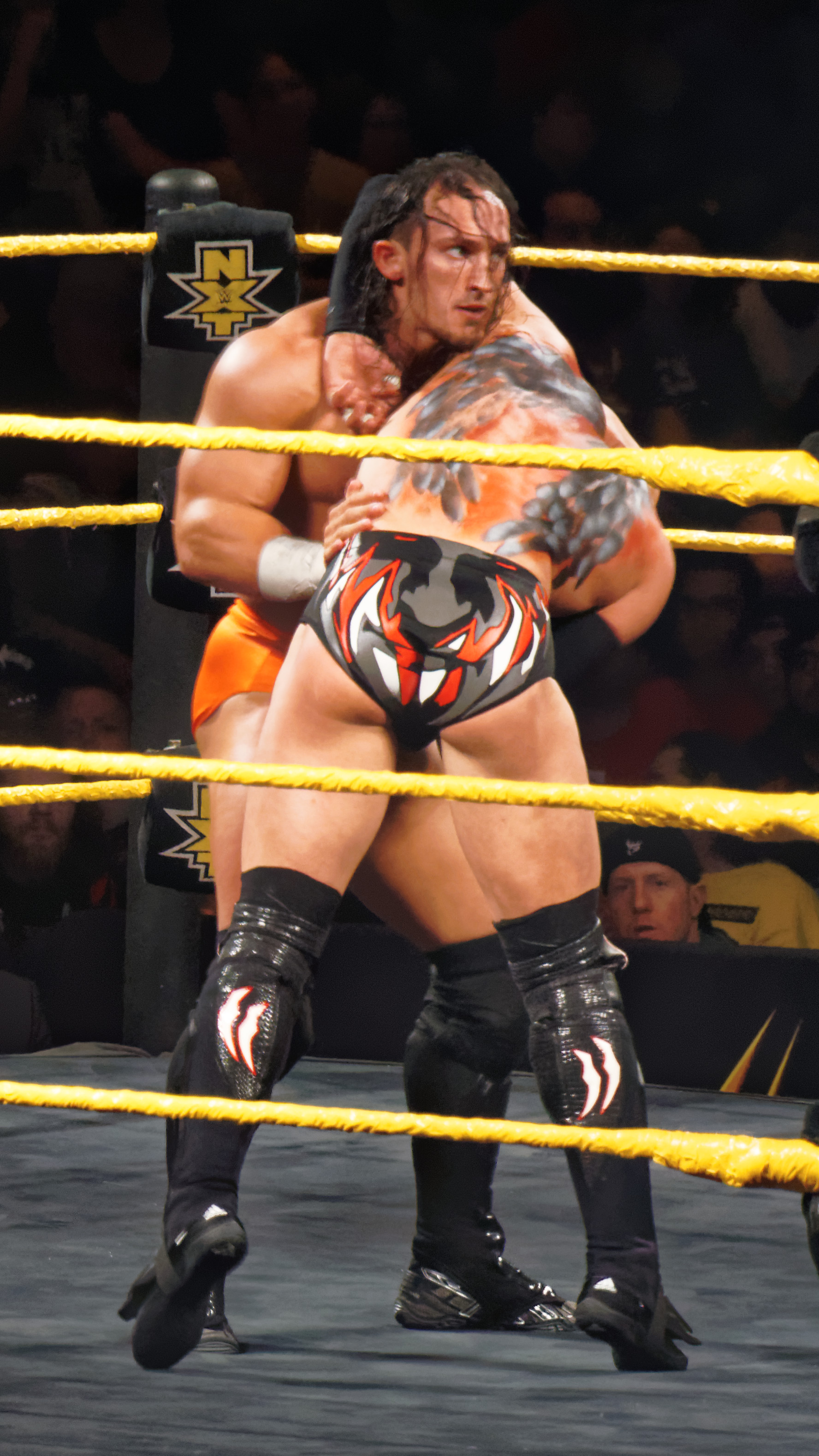 2015-03-28_00-52-50_ILCE-6000_4108_DxO